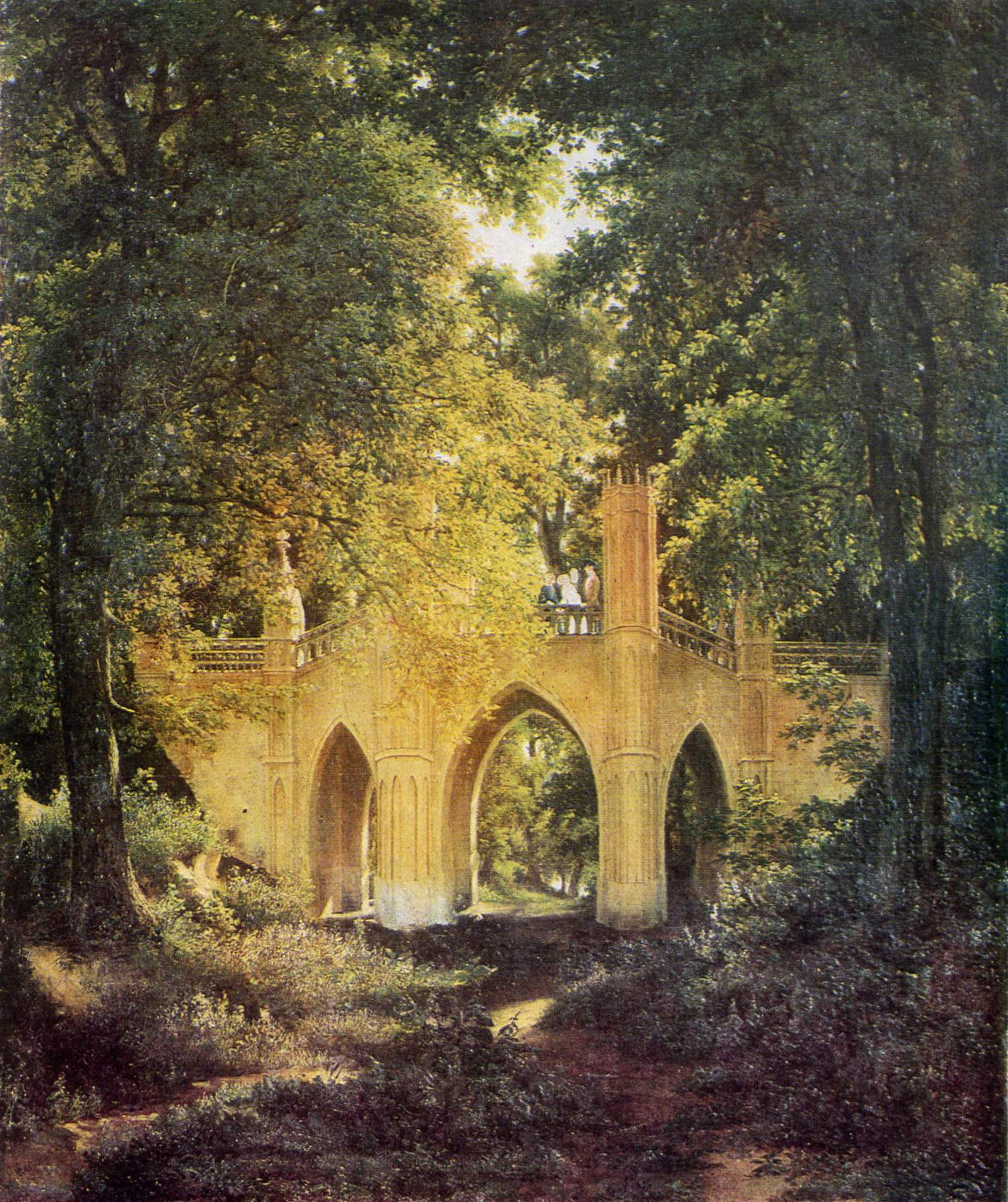 Готический мостик в Сокиринском парке. Волосков. Холст, масло. Хранится в Черниговском областном художественном музеи.